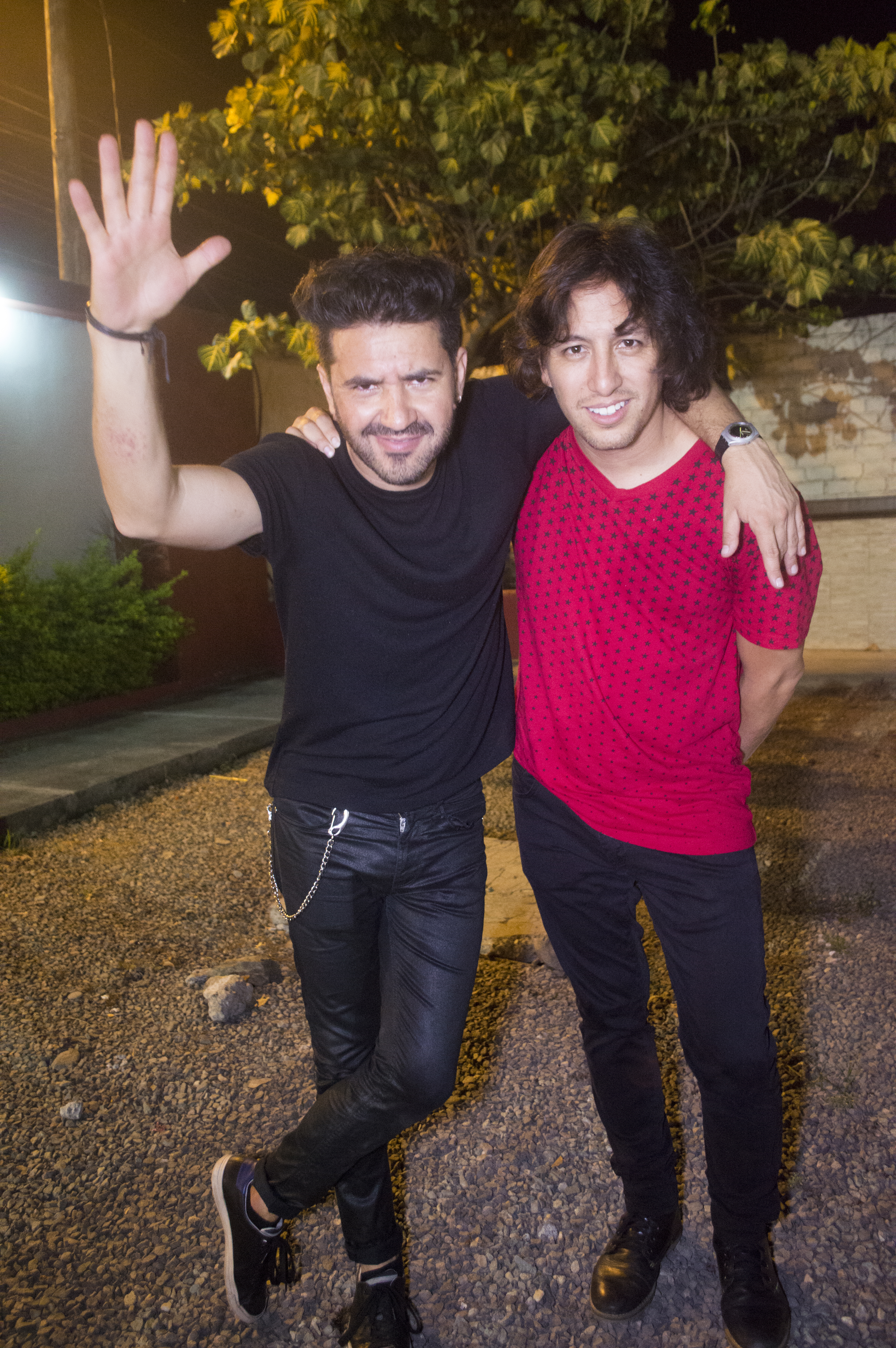 Darío Castro y César Galarza de Verde 70, en Milagro, en 2016.